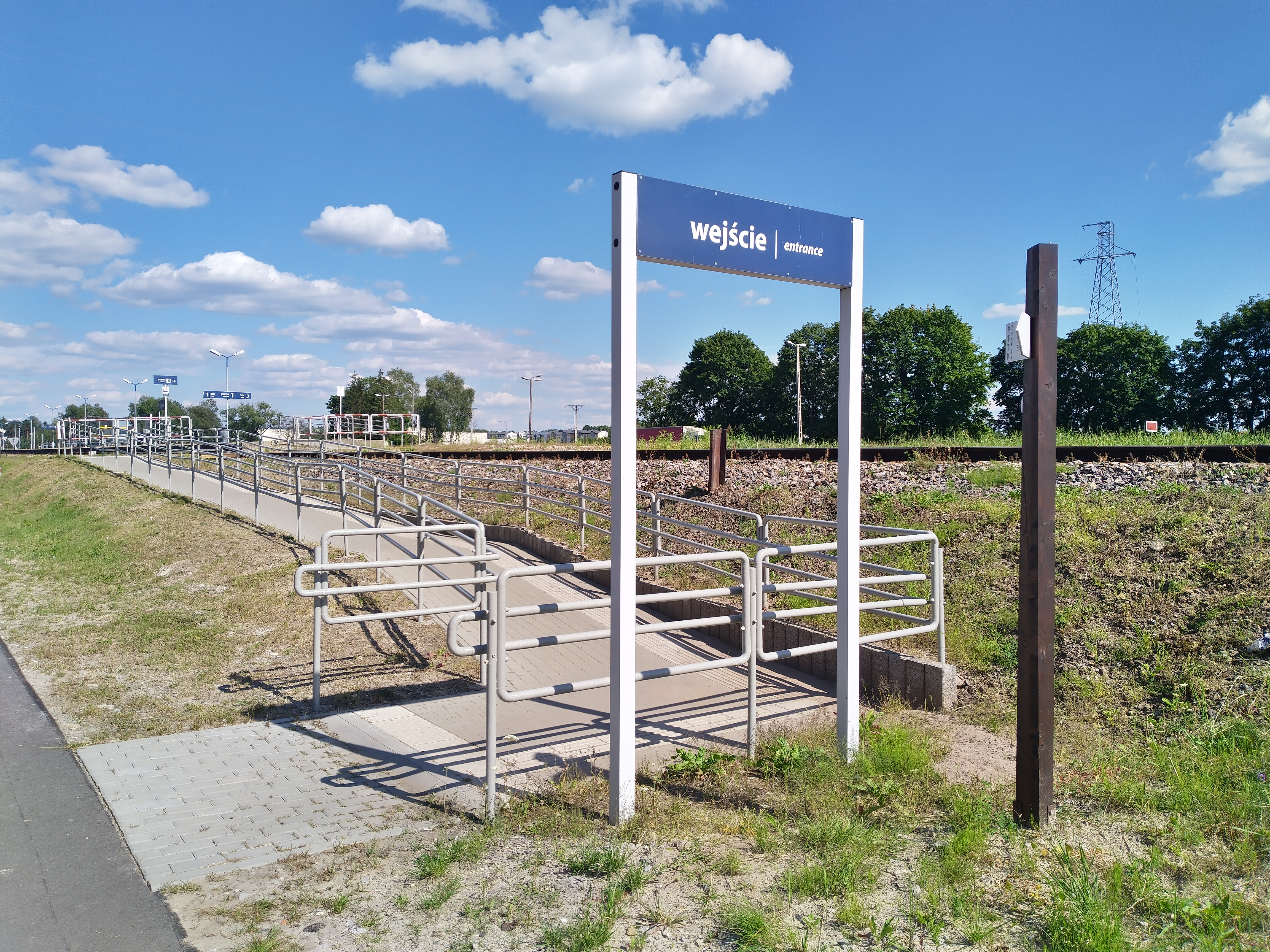 Peron 1 na stacji kolejowej Biłgoraj.